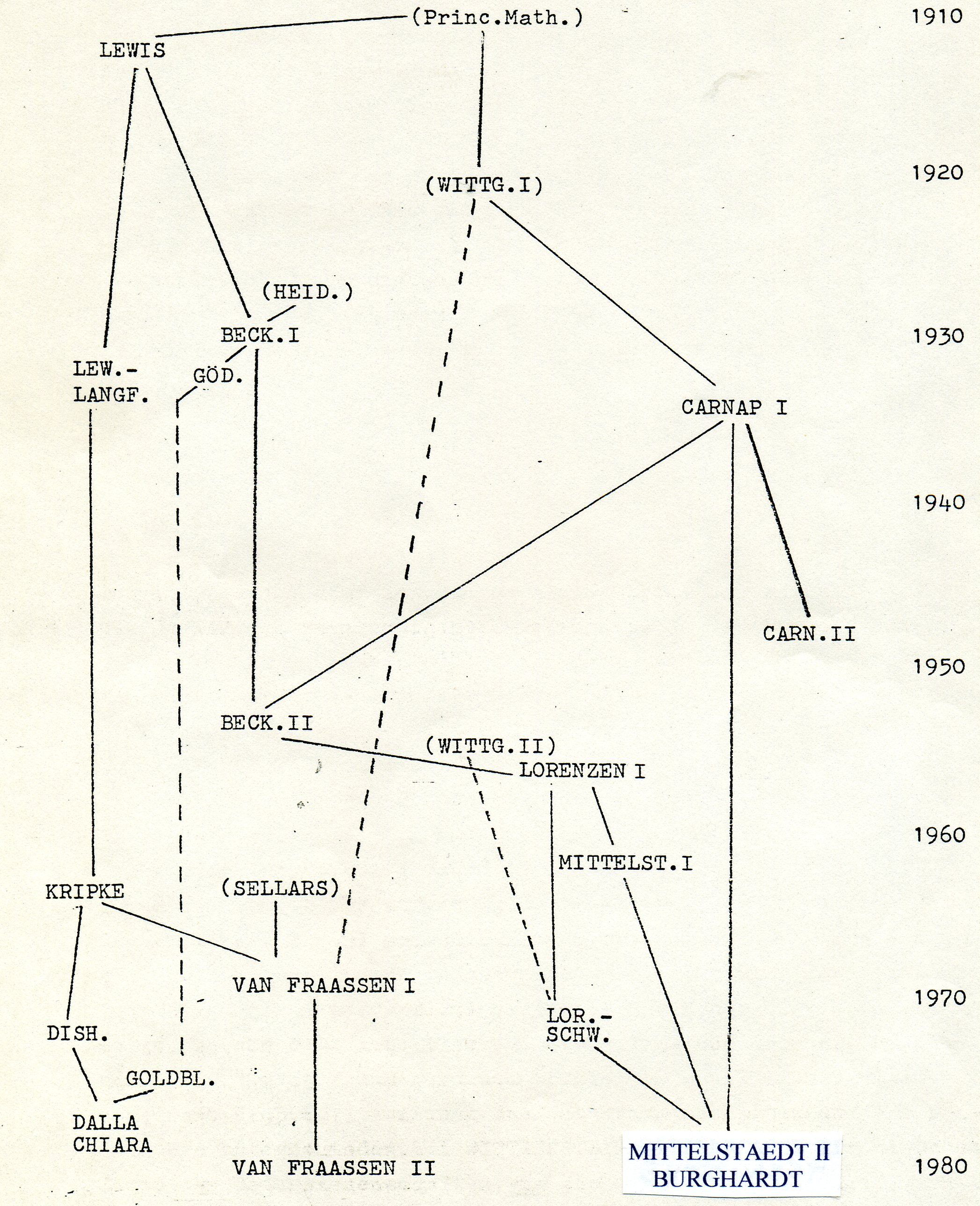 Entwicklung der Modallogik im 20. Jahrhundert